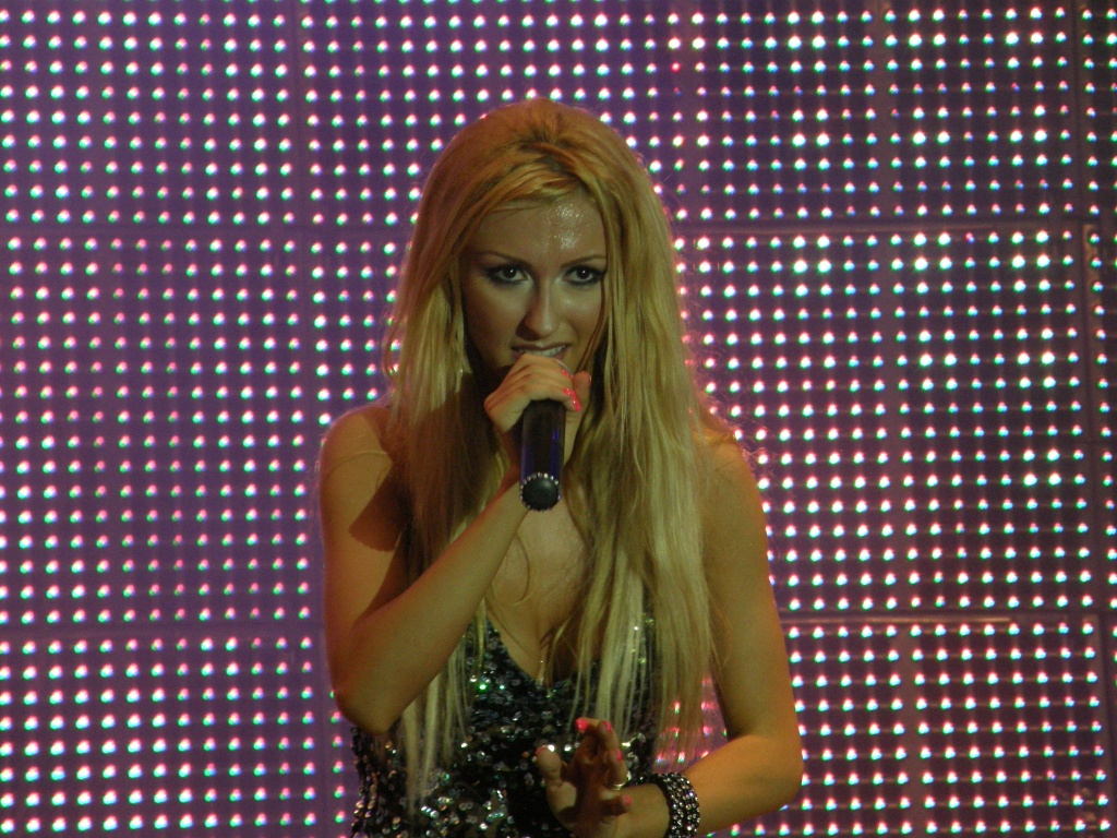 Andreea Bălan in concert la Shopping Center Militari (Auchan Militari) pe 17 iulie 2009